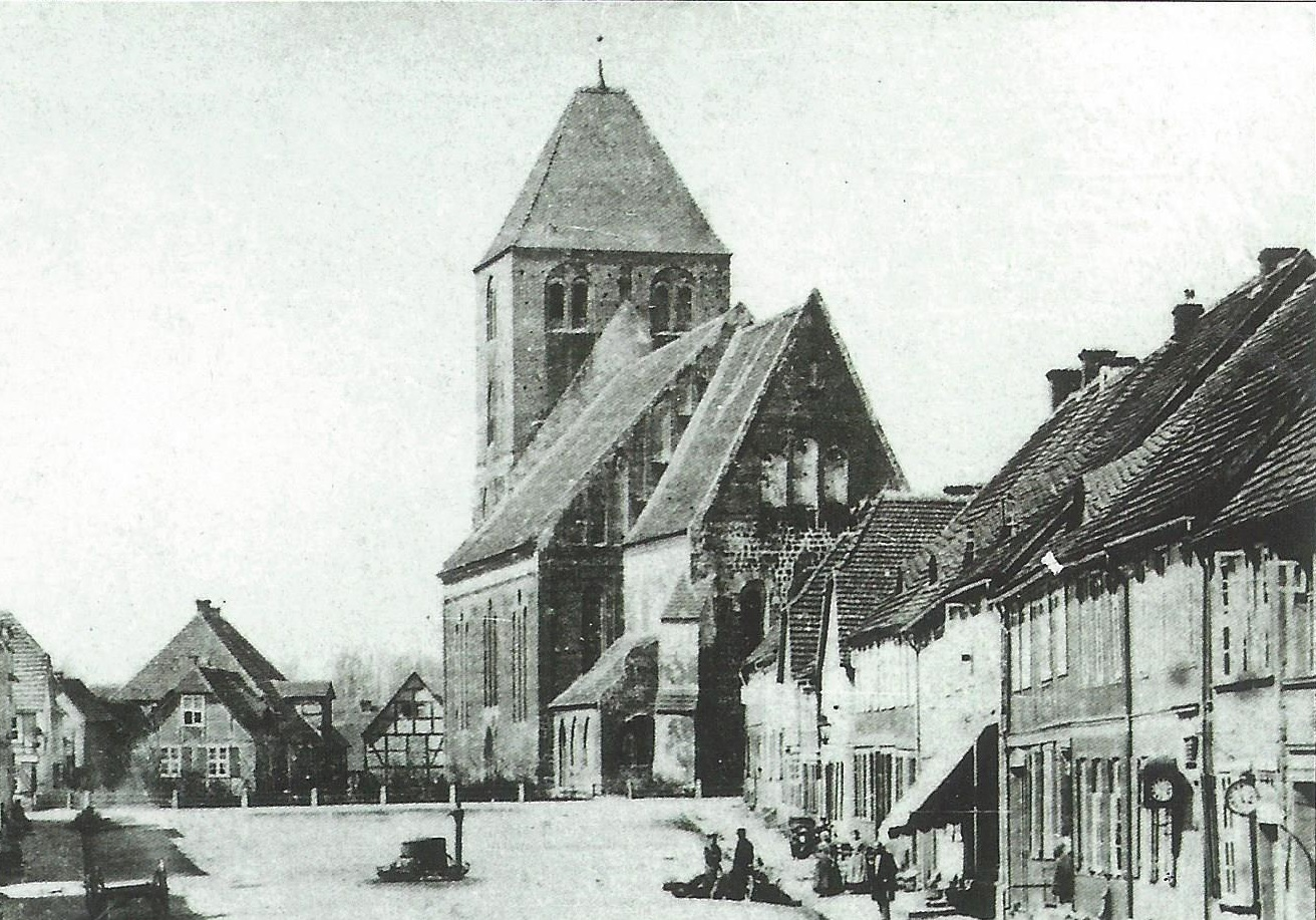 Marienkirche am Markt in Plau am See.